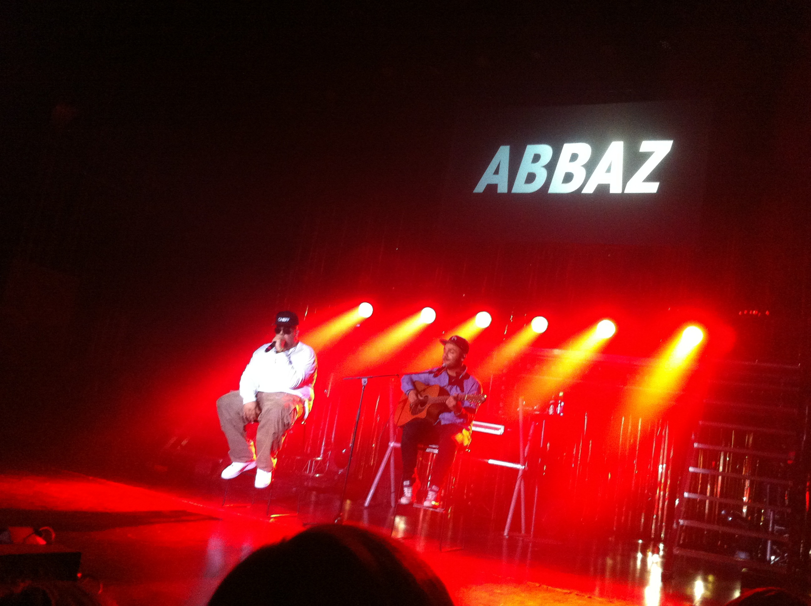 Abbaz og topgunn